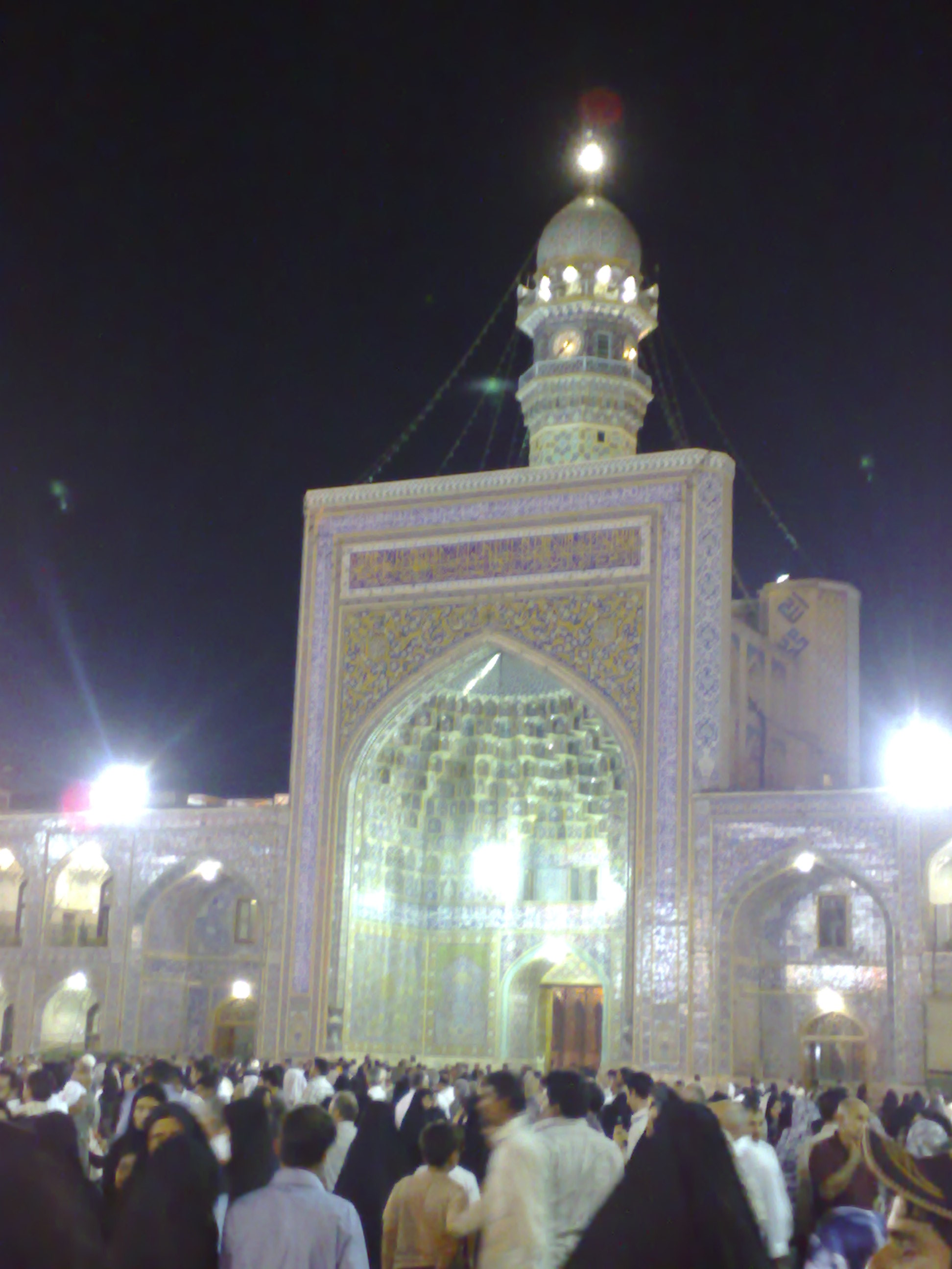 ایران - مشهد مقدس - حرم امام رضا (ع)